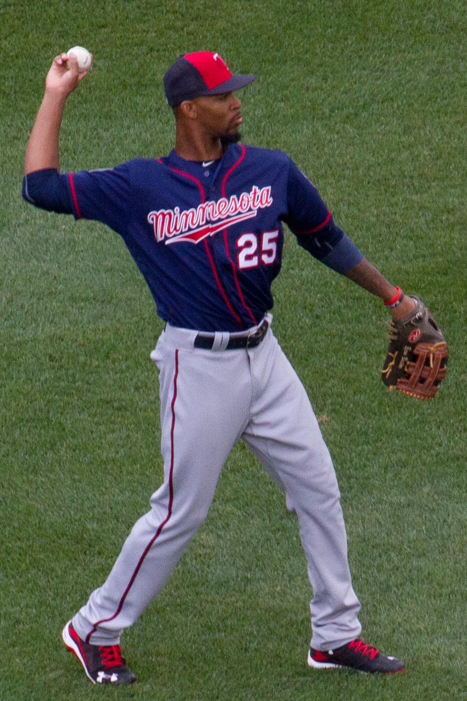 Byron Buxton